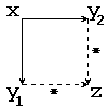 Definição de confluência local (ou fraca). Linhas sólidas representam o quantificador universal e linhas tracejadas representam o quantificador existencial.